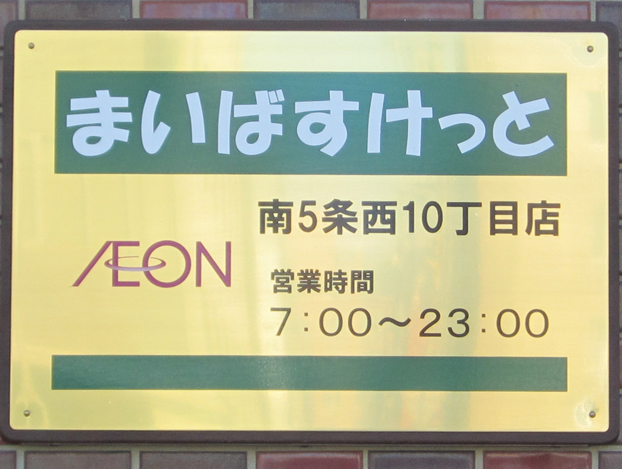 まいばすけっとロゴ